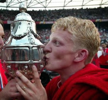 Dirk Kuyt